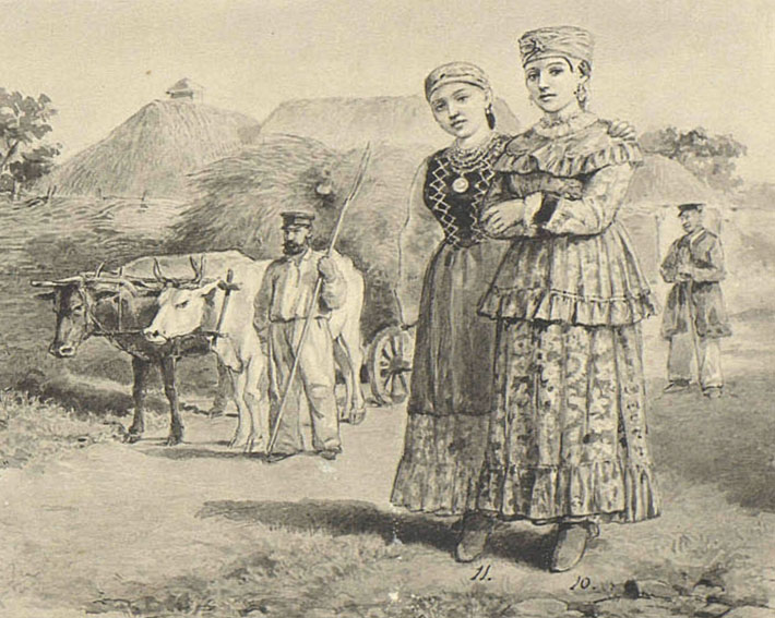 Жінка та дівчина з Бирюцького повіту Воронізької губернії. На обох спідниці і ситцеві фартухи. В жінки ситцева сорочка; на голові - очіпок, пов'язаний хусткою. В дівчини оксамитовий корсет; волосся заплетене зі стрічкою в одну косу, а на голові пов'язка і квіти. Обоє в червоних чоботях і шиї в обидвох прикрашені намистами.